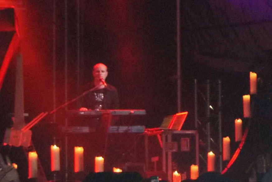 Henning Verlage beim Unheilig-Auftritt auf dem Hexentanz-Festival 2010